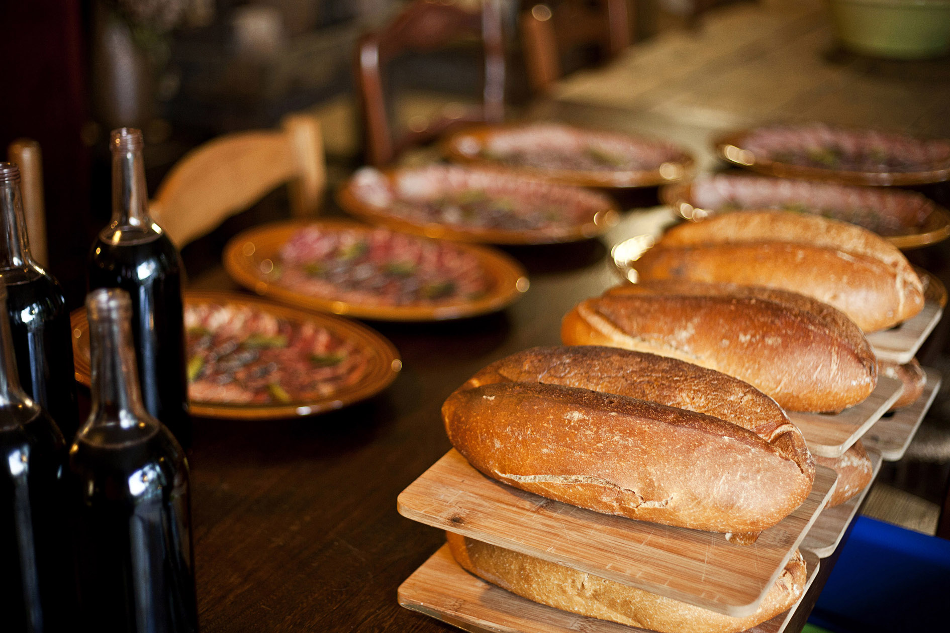 Pain sans gluten à la farine de châtaigne et charcuterie corse